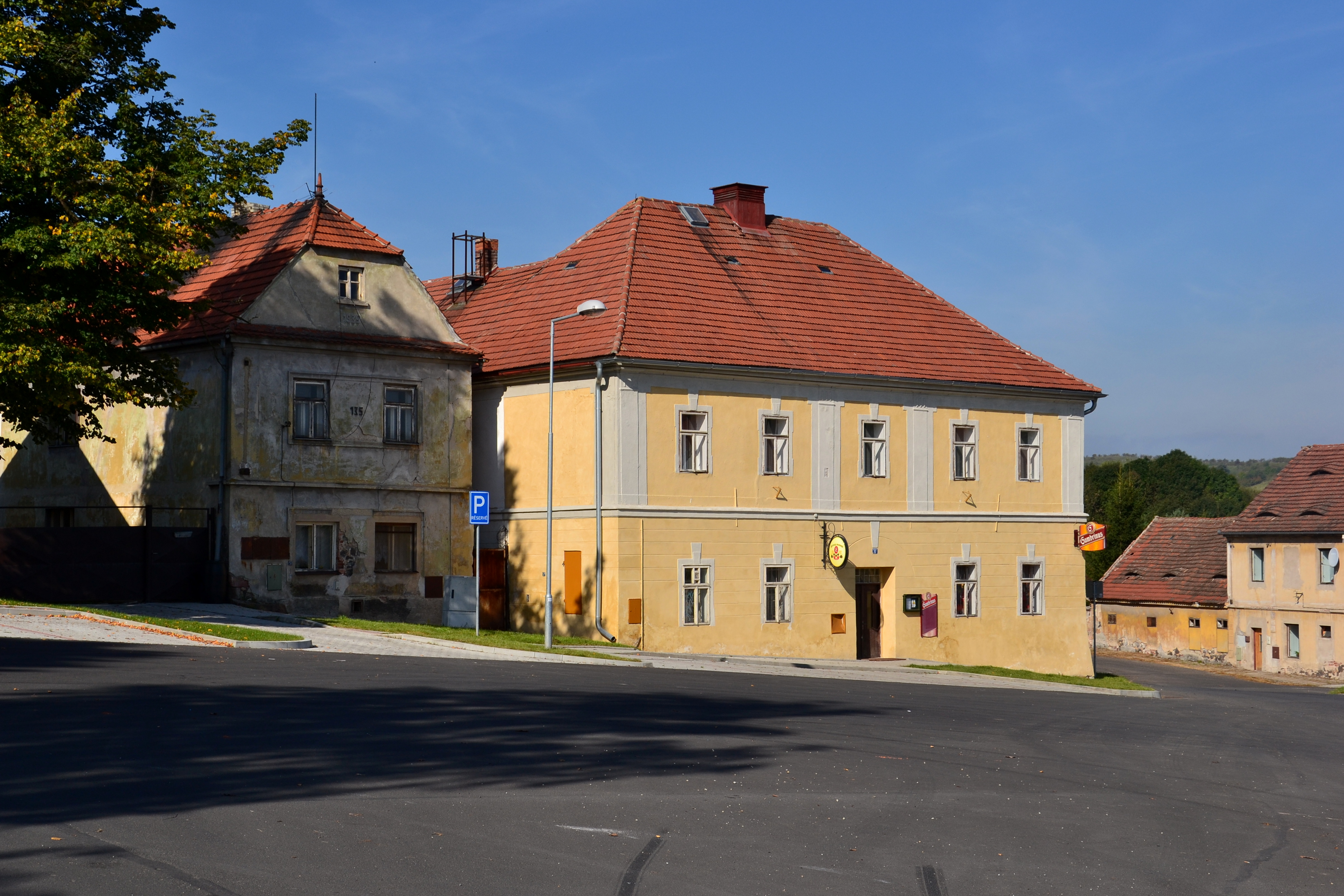 Buškovice - jižní náves